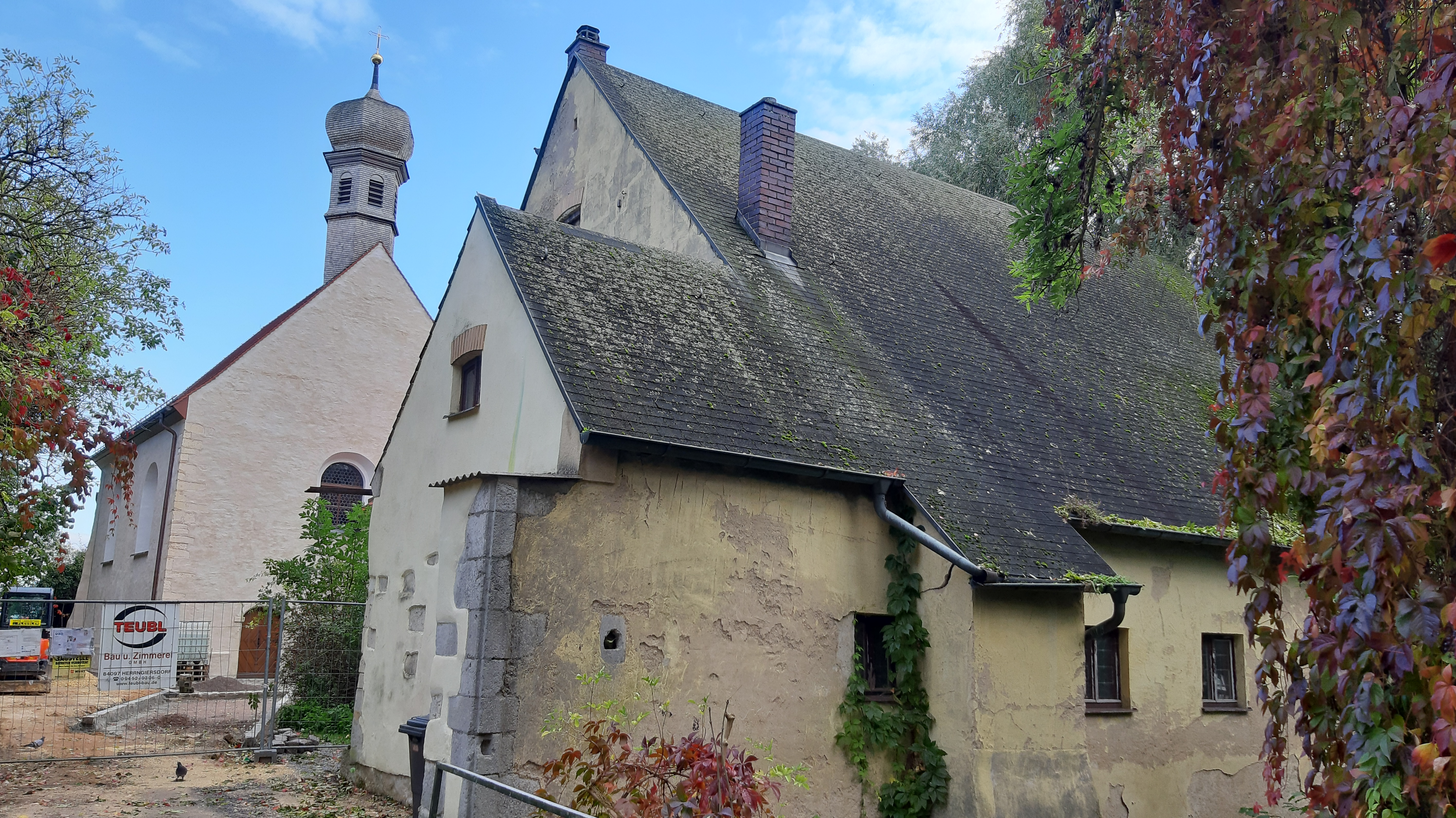 Denkmalgeschützte Schlosskapelle St. Michael der abgegangenen Burg Graß in Regensburg